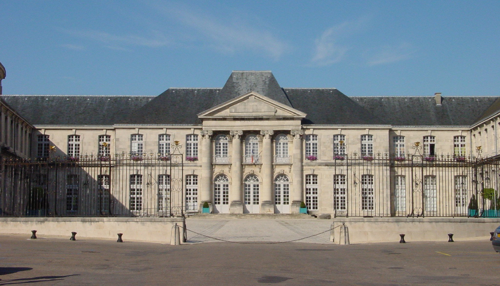 Schloss Commercy, Hofseite